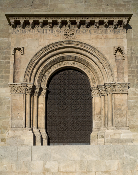 unidentified Spain